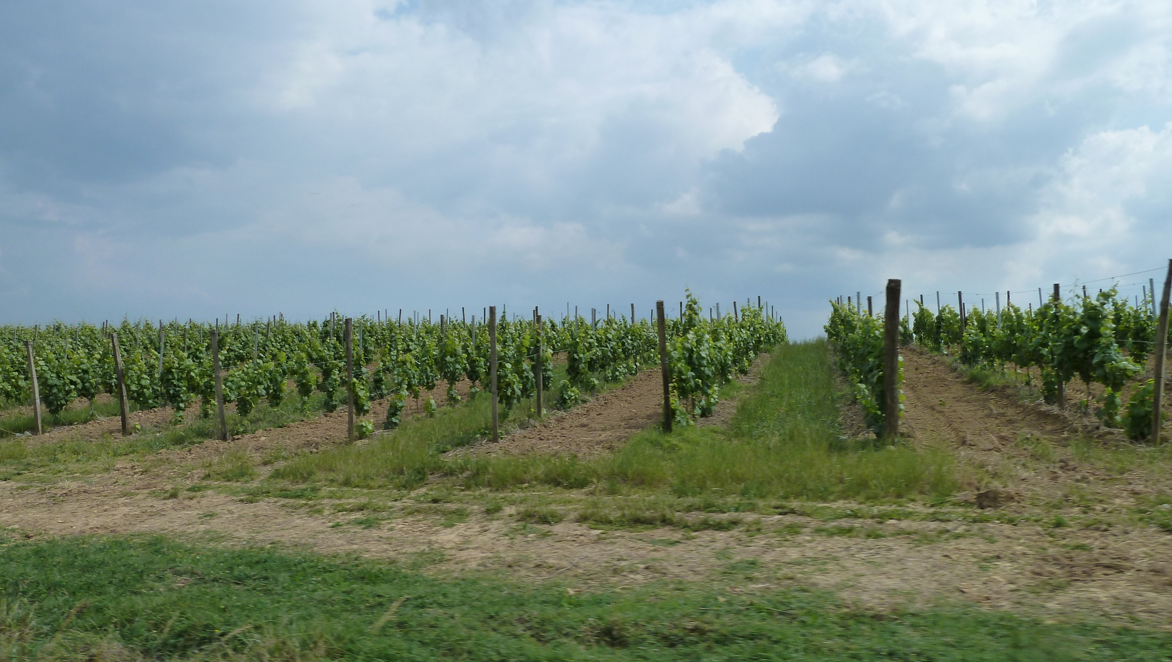 Vignes à Moncaup (Pyrénées-Atlantiques)